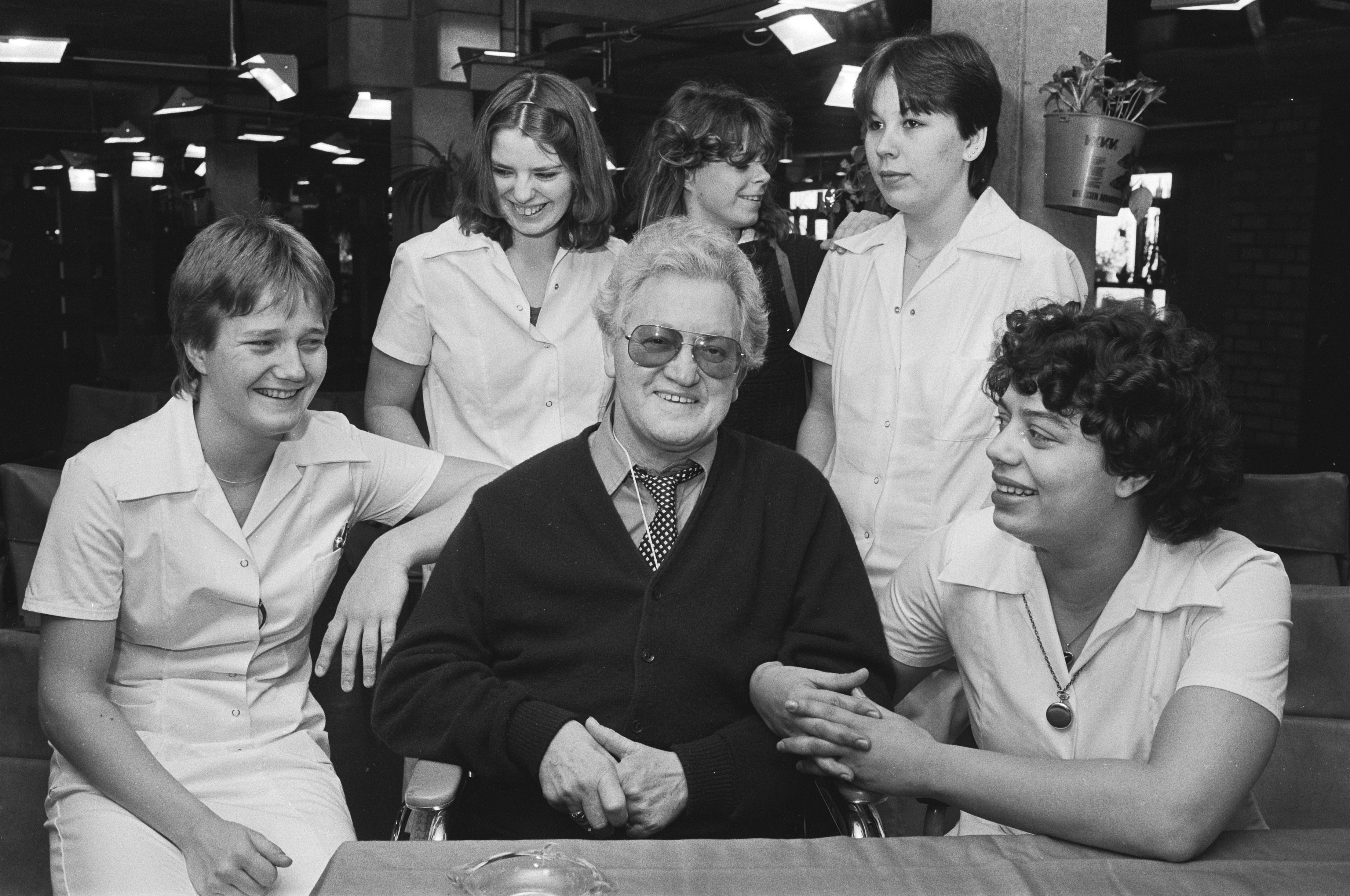 Collectie / Archief : Fotocollectie Anefo Reportage / Serie : [ onbekend ] Beschrijving : A'damse zanger Johnny Jordaan revalideert in verzorgingstehuis "De Drie Hoven" na een beroerte Datum : 21 januari 1982 Locatie : Amsterdam, Noord-Holland, Slotervaart Trefwoorden : revalidatie, verpleegkundigen, verzorgingstehuizen, zangers Persoonsnaam : Jordaan, Johnny Fotograaf : Antonisse, Marcel / Anefo Auteursrechthebbende : Nationaal Archief Materiaalsoort : Negatief (zwart/wit) Nummer archiefinventaris : bekijk toegang 2.24.01.05 Bestanddeelnummer : 931-9226 Reacties Geplaatst door Amsterdammertje op 15 mei 2015 - 19:09. Verzorgingshuis 'De Drie Hoven' in Slotervaart